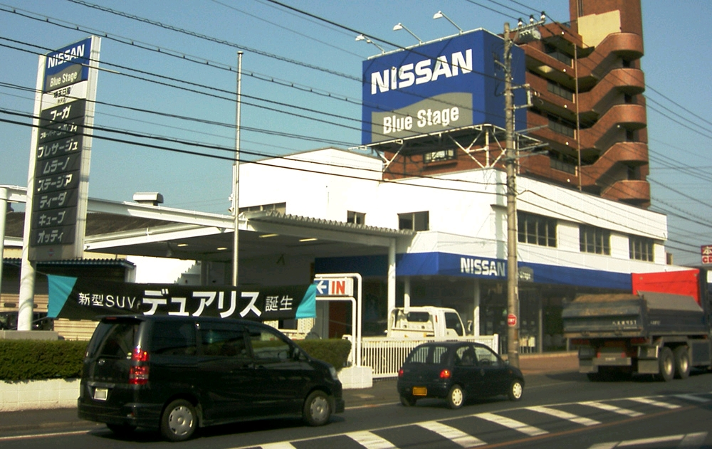 “Nissan_Car_dealership_Tokorozawa_Saitama”